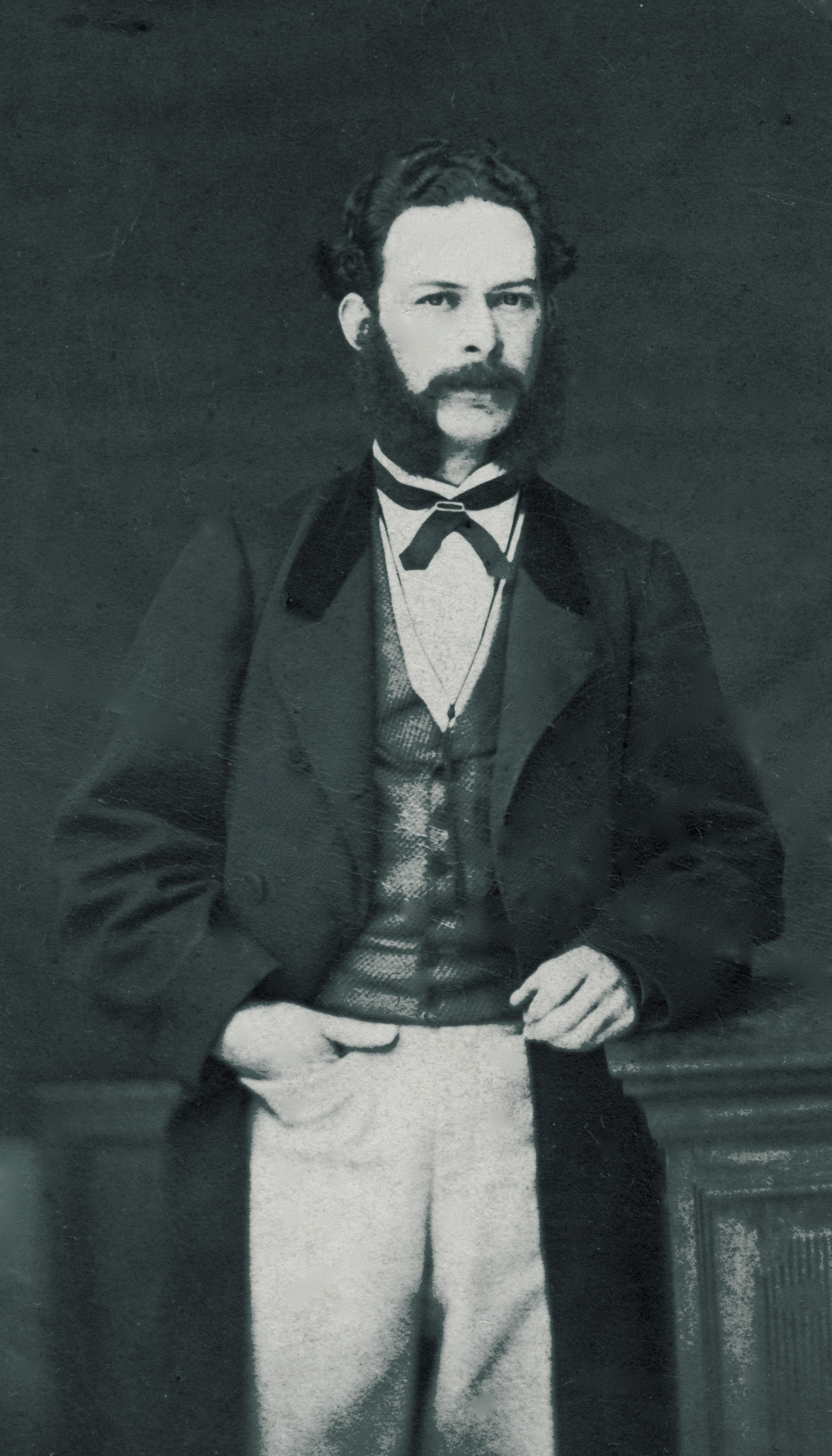 Ilmo. Sr. D. Juan Francisco Régis José del Granado y Flores de Vergara, II conde de Cotoca